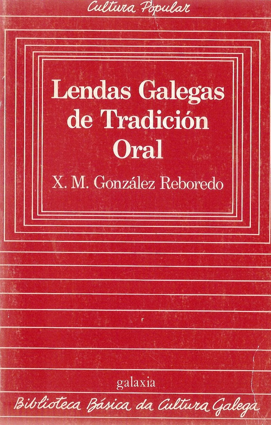 Biblioteca Básica da Cultura Galega, 17, Lendas Galegas de Tradición Oral, X. M. González Reboredo.jpg